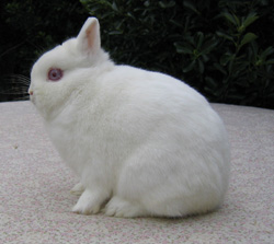 Roodoog Pool, eigen dier, eigen foto. U kan soortgelijke foto's en ook andere bekijken op mijn website De foto werd gemaakt op 6/2/2004 met een canon digitale camera